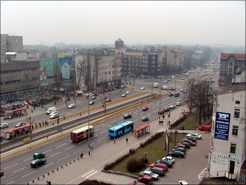 Lodz - skrzyżowanie ulic Kościuszki i Mickiewicza